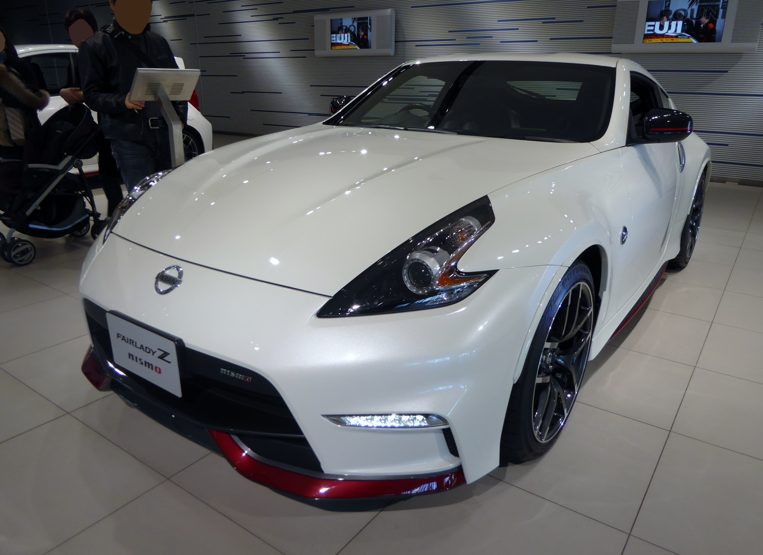 CBA-Z34型日産・フェアレディZニスモをフロントから撮影。